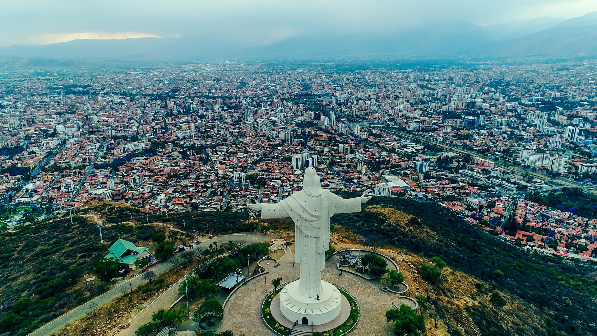 Vista Aerea del Cristo de la Concordia